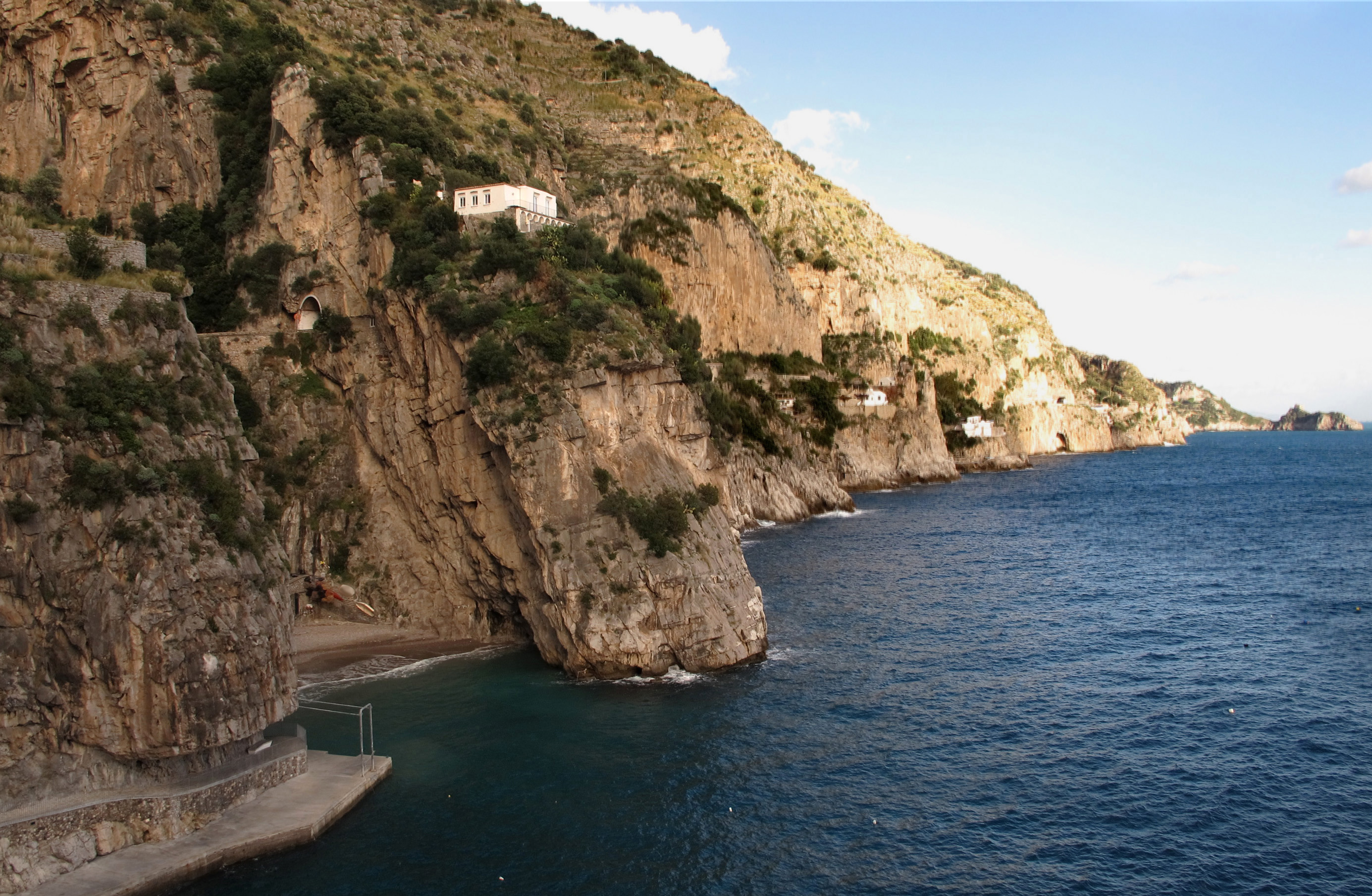 Marina di Praia, Praiano, Italie.